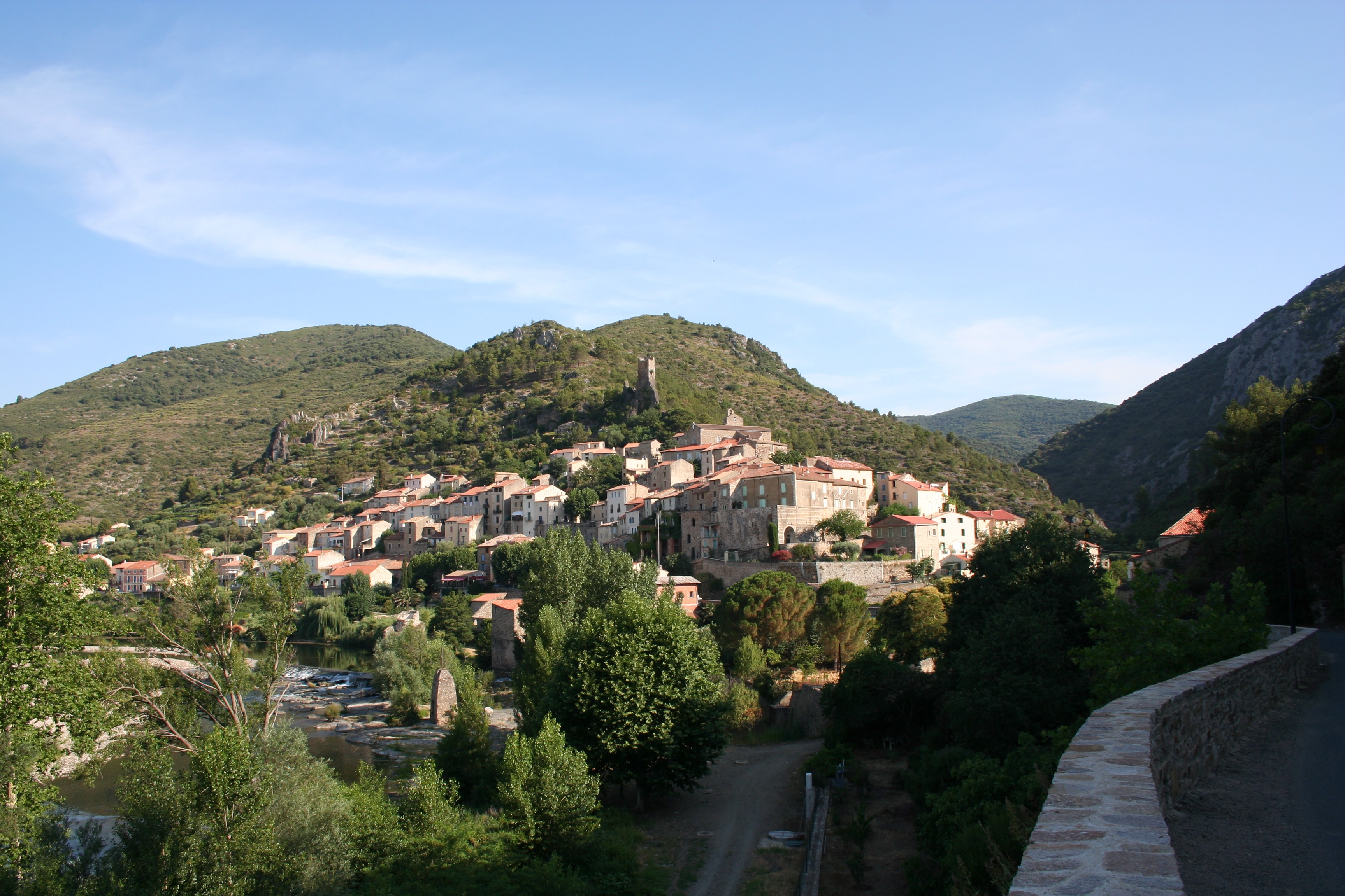 Roquebrun, vue d'ensemble, Hérault, France.